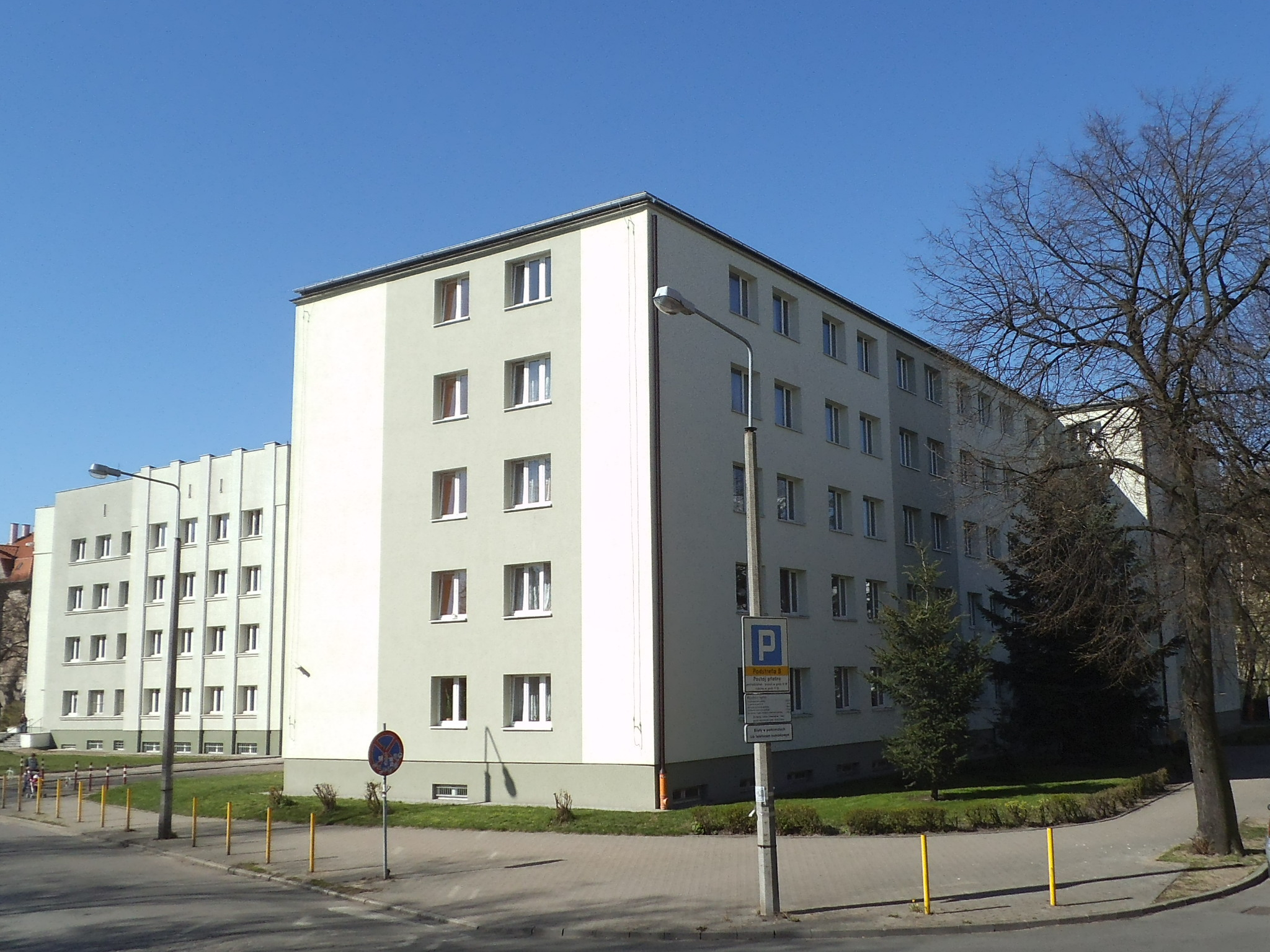 Akademik w Toruniu